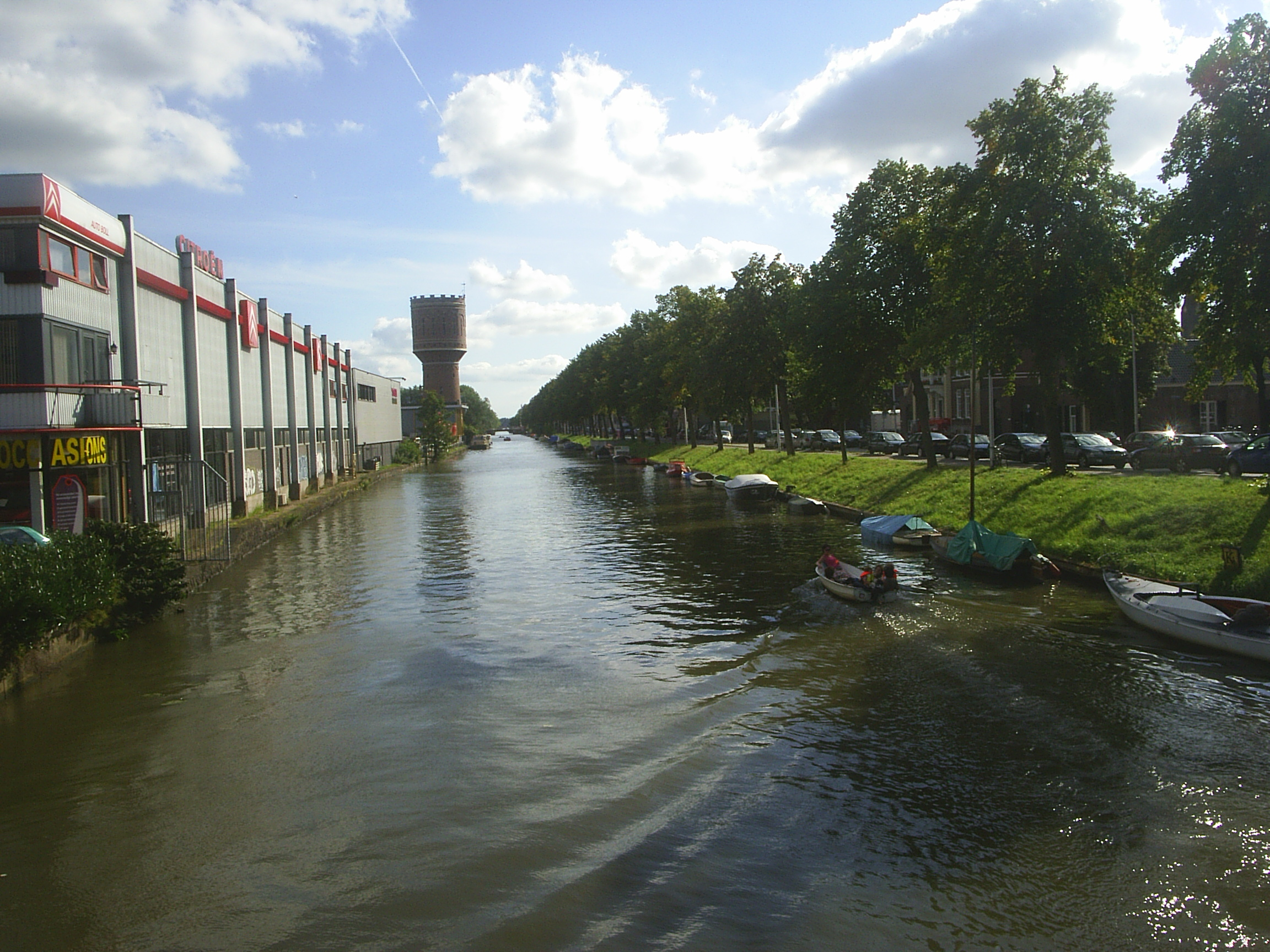 Vaartse Rijn, Utrecht, The Netherlands